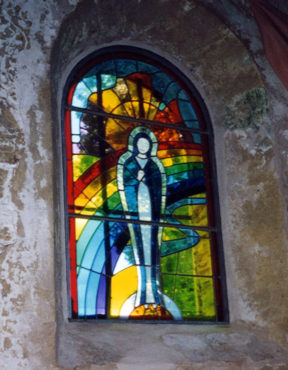 Auteur : Daniel Le Roy Description : Photo du vitrail prise par l'auteur en l'an 2000